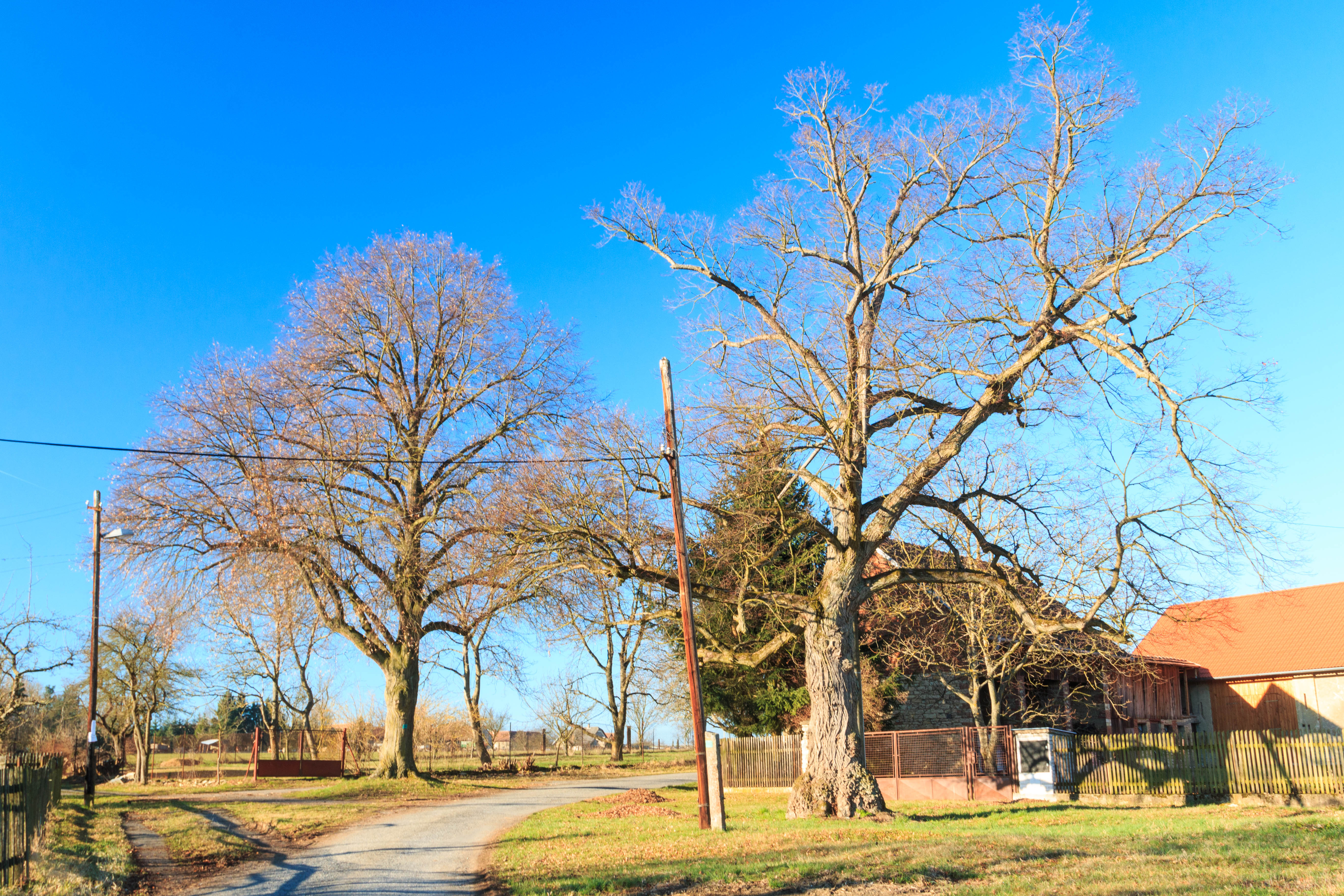 Nová Ves u Skutče - klípy u domu čp. 697